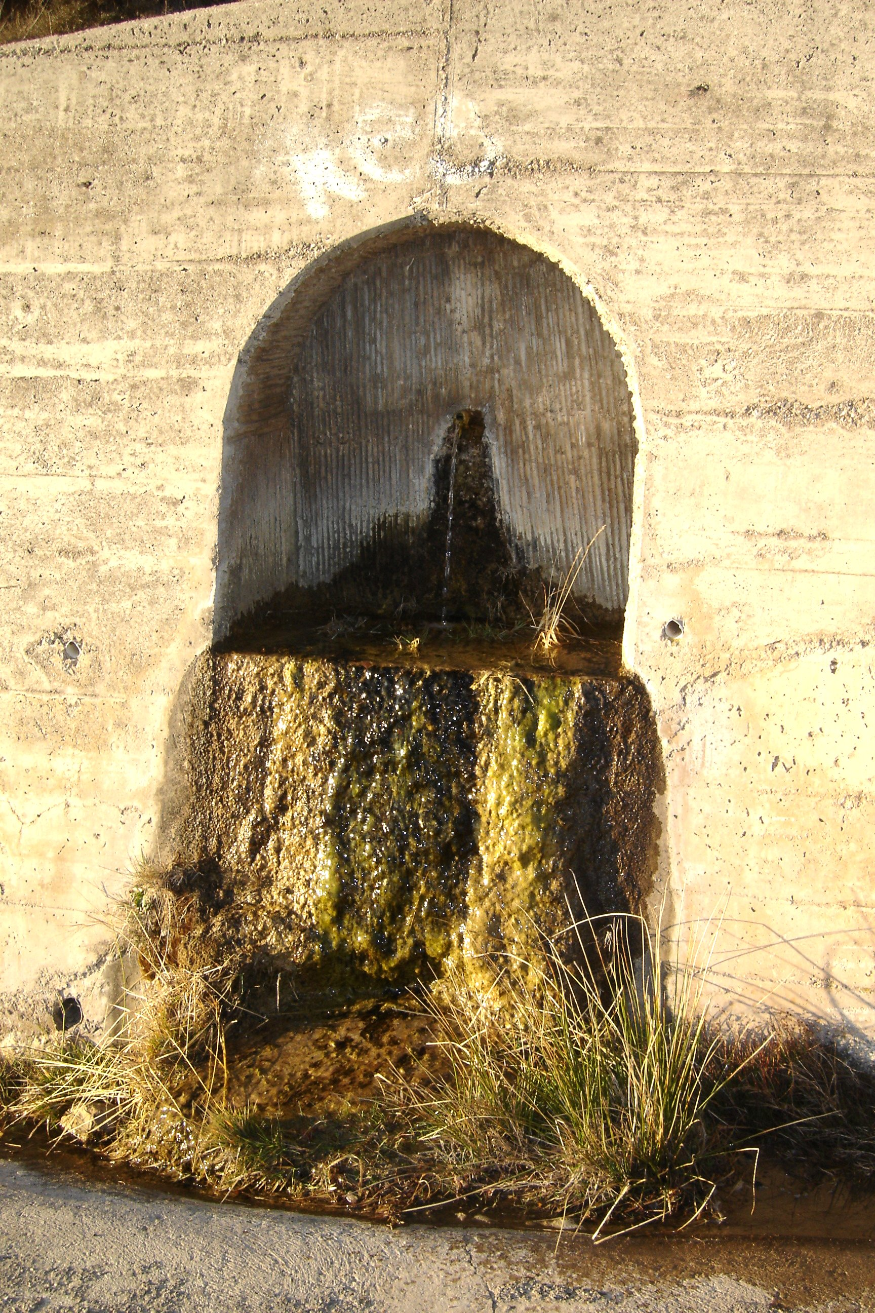 La font de Fenarals, al municipi de Guixers (Solsonès)